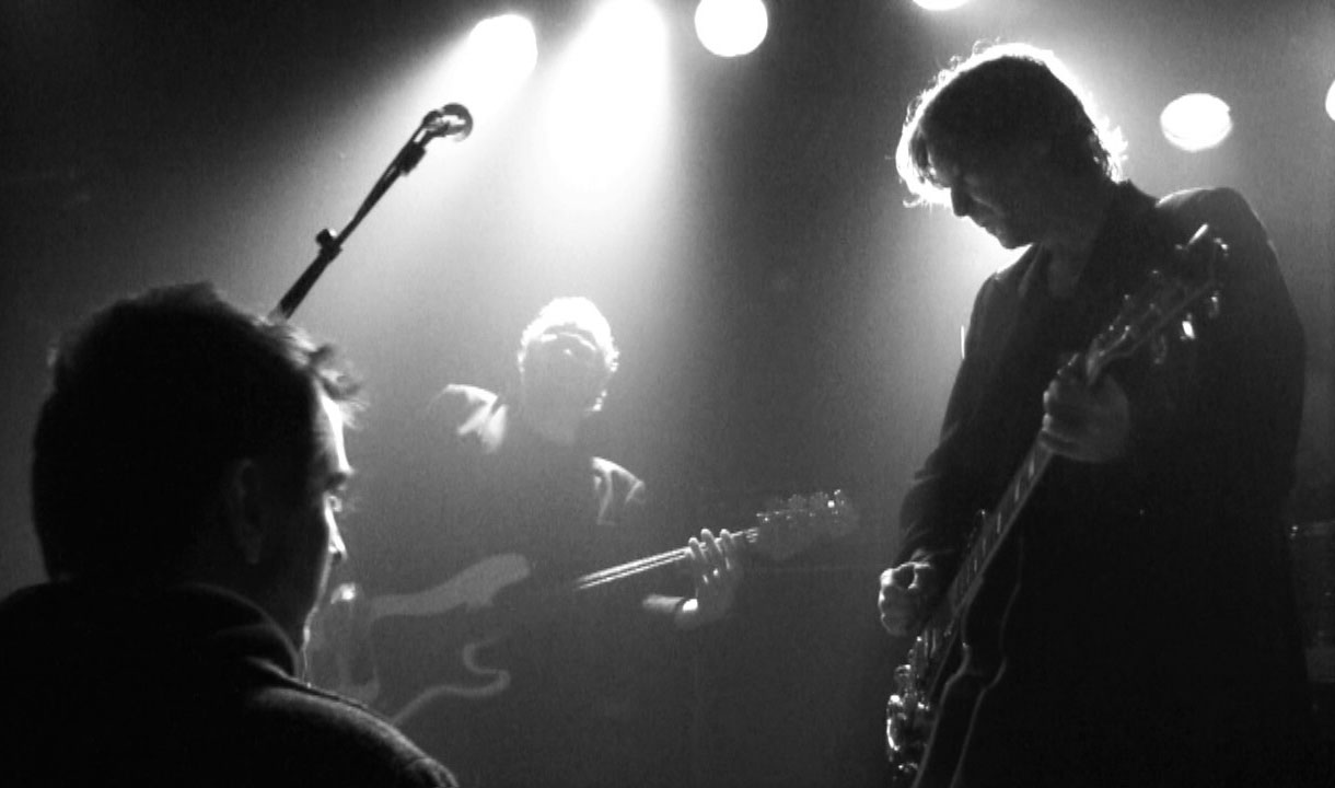 Liliedugg, Gunnar Mo, Torgeir Vikan